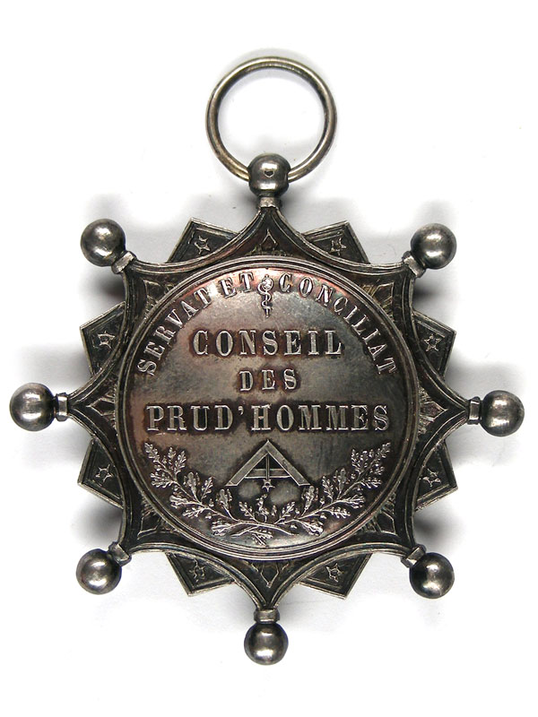 Revers de l'insigne de fonction de membre des Conseils des Prud'hommes, modèle anonyme en argent, 66 mm de diamètre, France, 2e moitié du XIXe siècle.